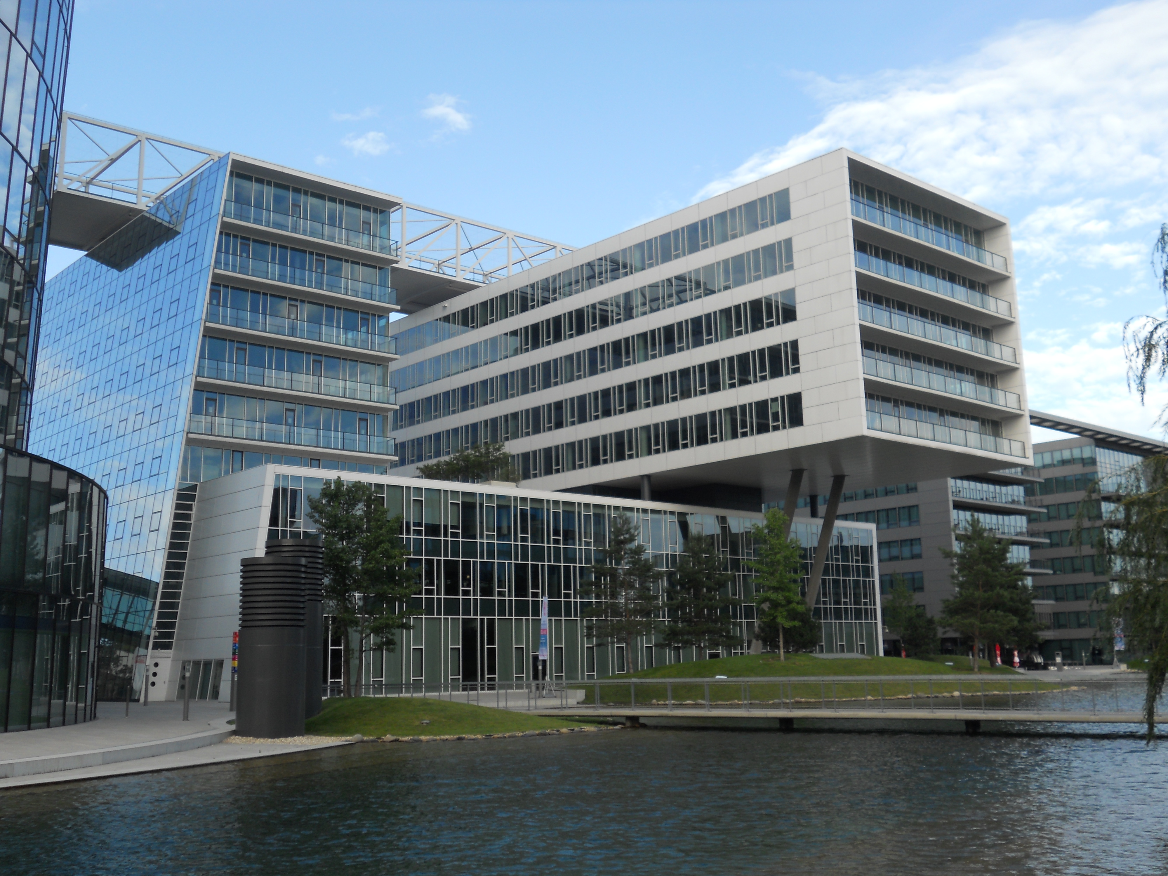 Das Bürohaus "Plus Zwei" liegt im Büropark "Viertel Zwei".